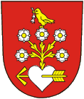 znak obce